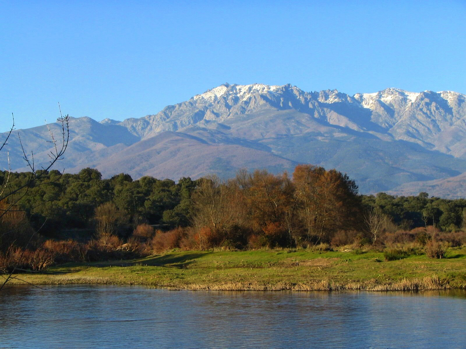 Imagen del río Tiétar con la Sierra de Gredos al fondo